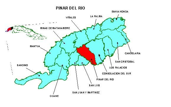 División de Pinar del Río en sus 14 municipios. En rojo, la ciudad homónima.